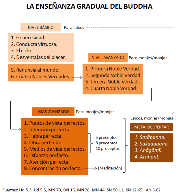 Enseñanza gradual del Buddha en seis etapas.